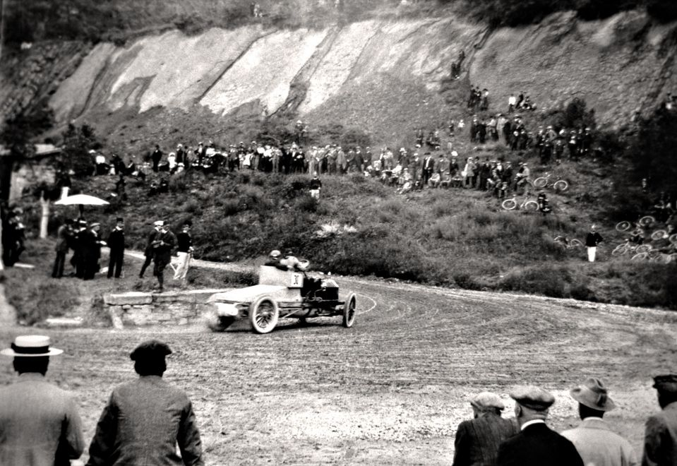 TRIESTE-OPICINA 1911 Passaggio di un concorrente alla curva delle Cave Faccanoni